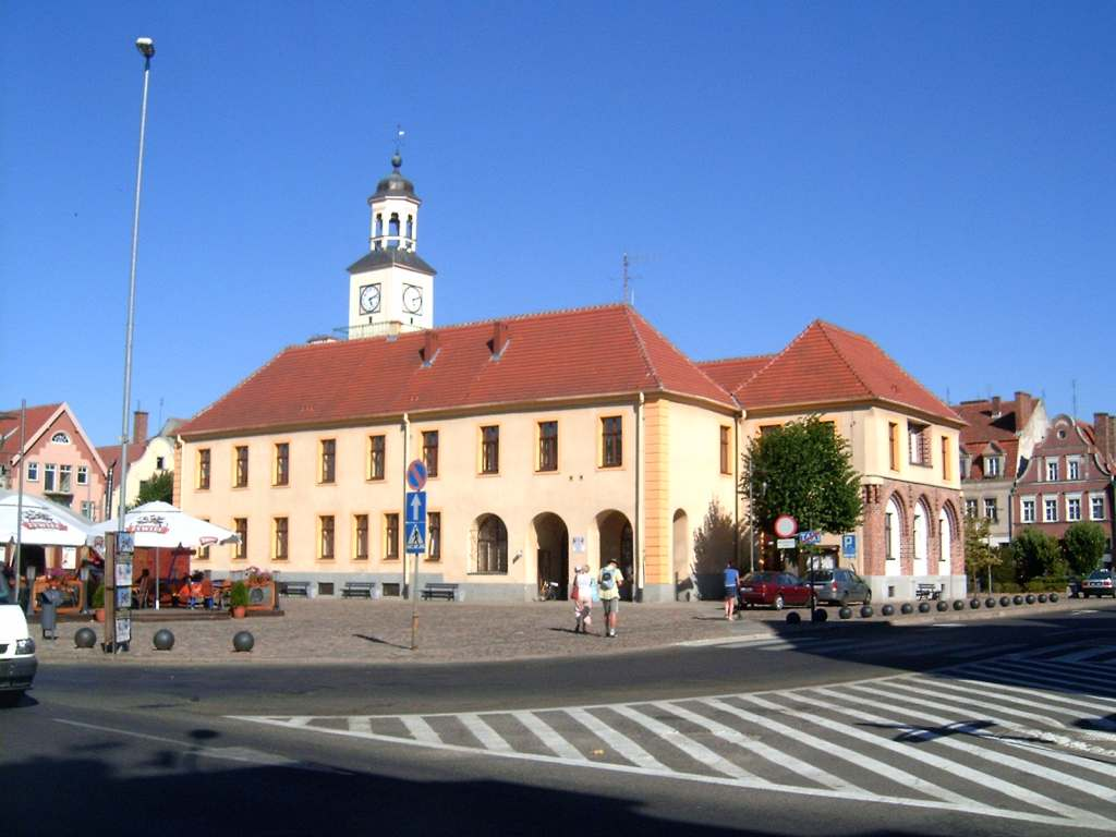 Trzebiatów - rynek